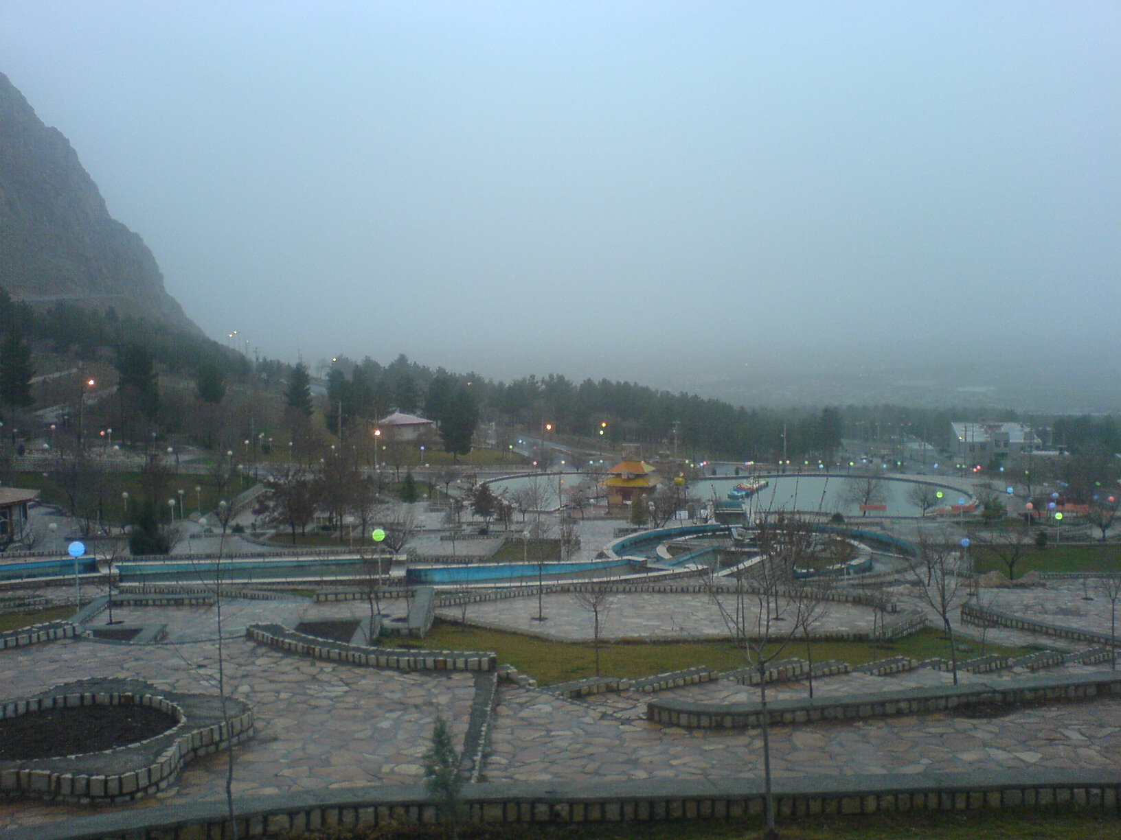 park of kuhestan, kermanshah, iran